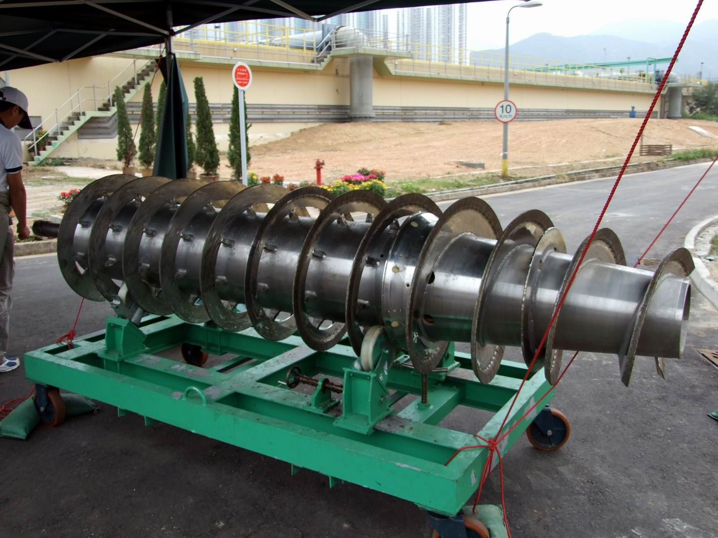 旋轉輸送帶